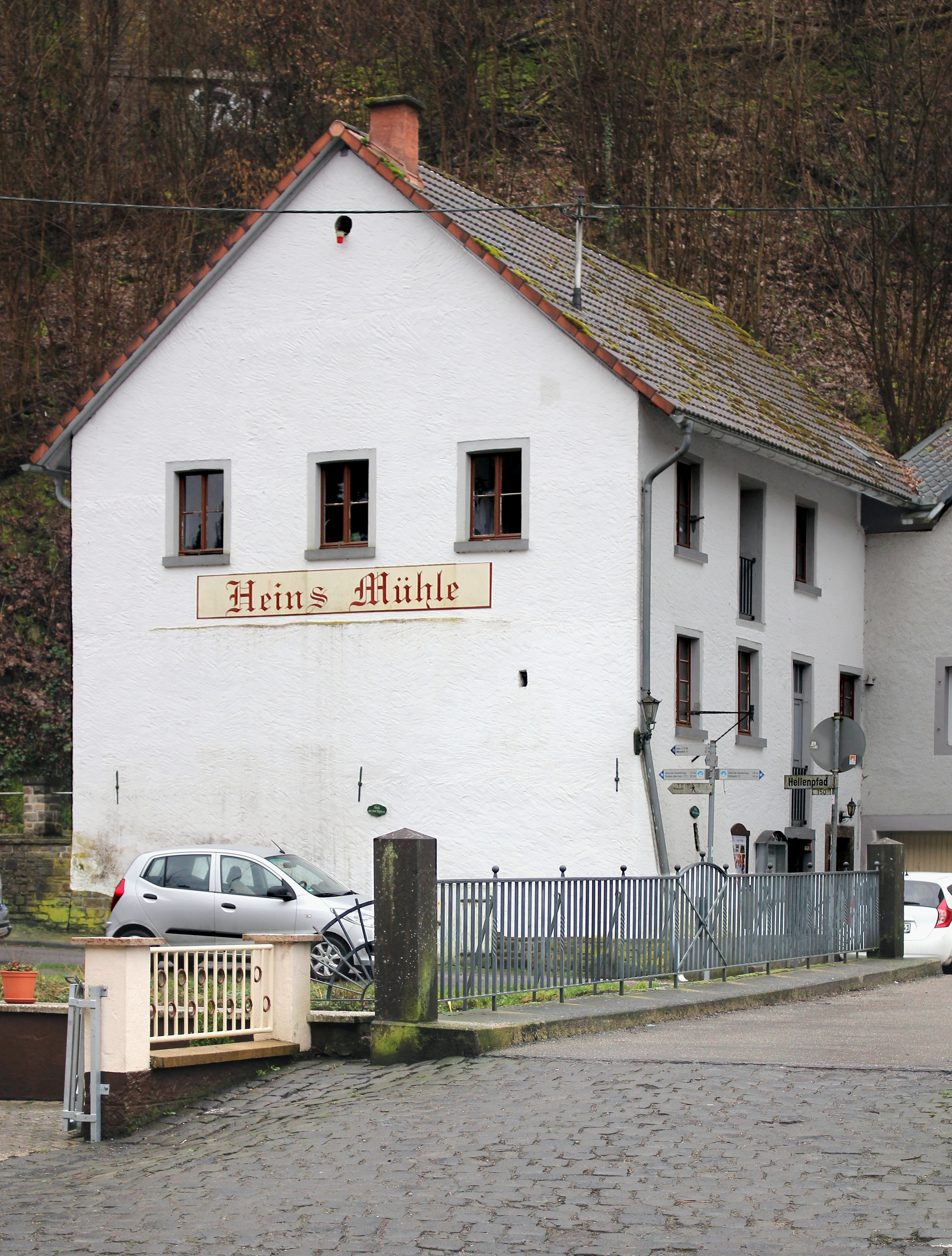 Hein’s Mühle in Sayn, Hauptgebäude